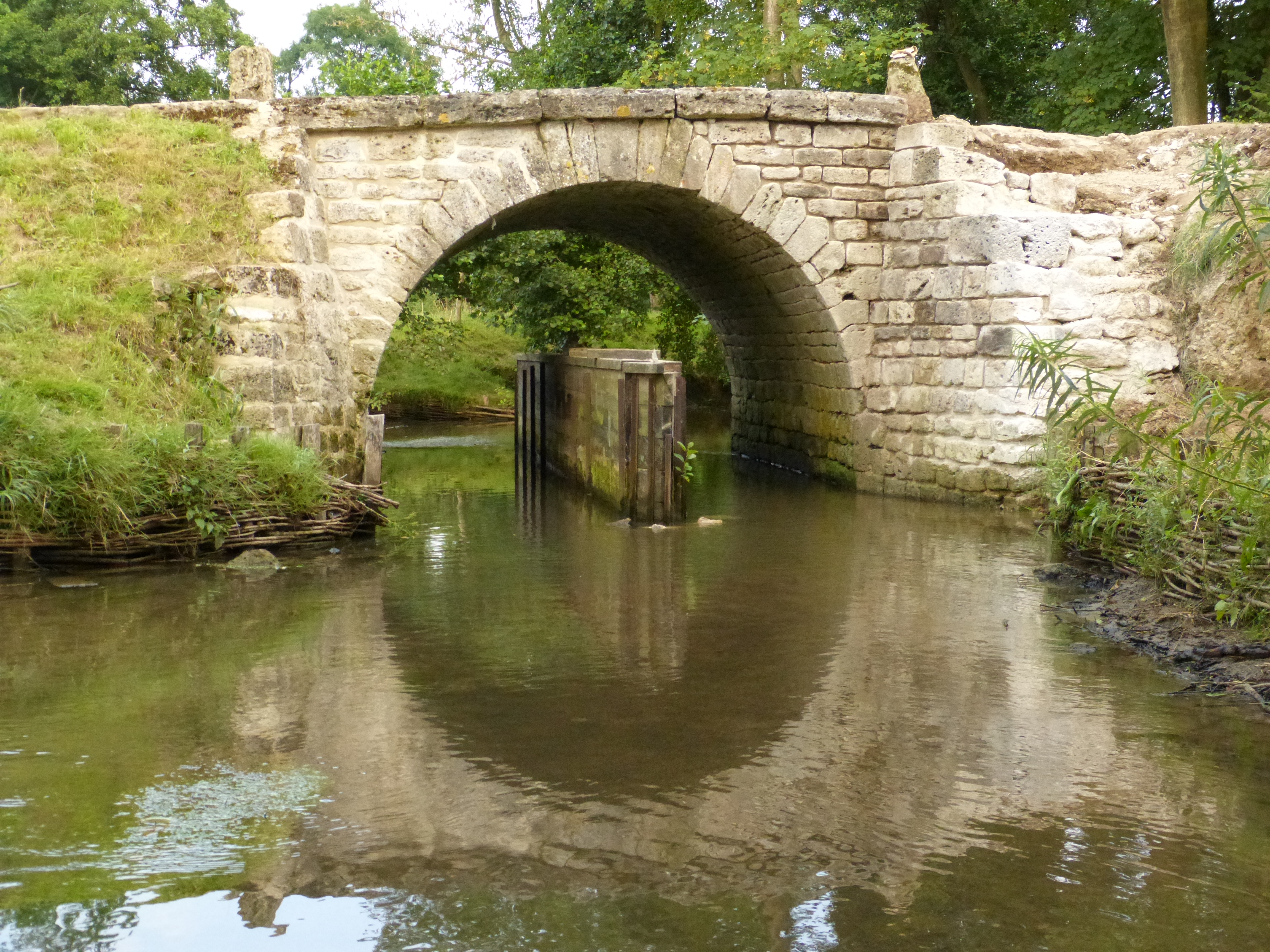 Le pont de Coq, sur l'Epte amont.